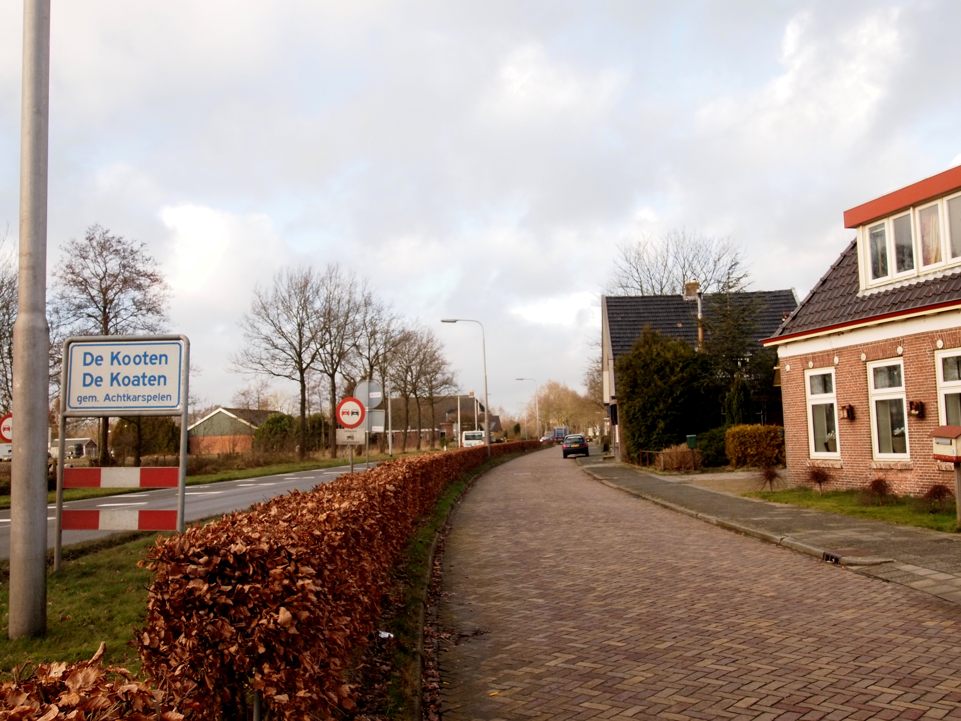 De Kooten